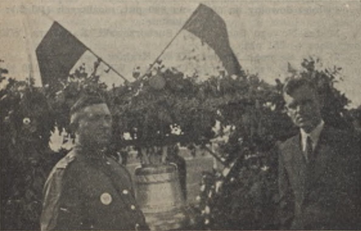 Асвячэнне звана імя Юзафа Пілсудскага ў вёсцы Вяце (цяпер Мёрскага раёна Віцебскай вобласці)